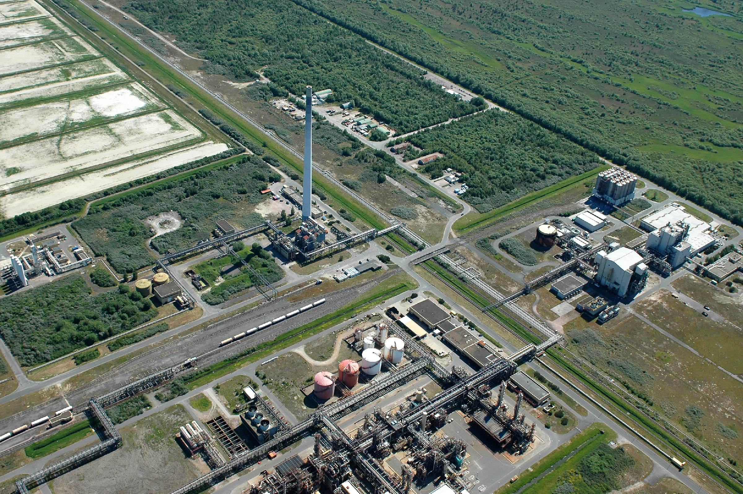 Fotoflug vom Flugplatz Nordholz-Spieka über Cuxhaven und Wilhelmshaven